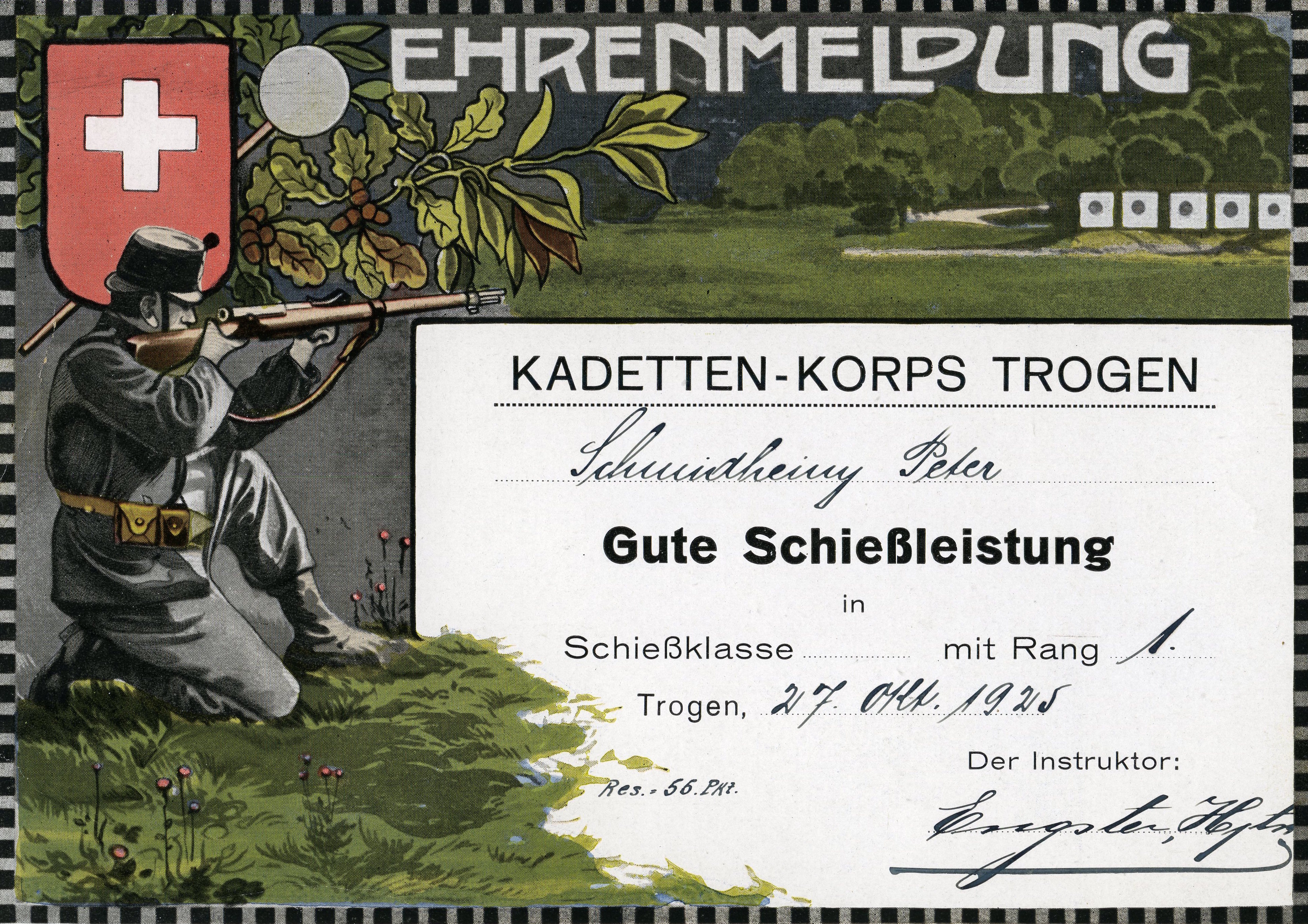 Anerkennungskarte des Trogener Kadettenkorps für gute Schiessleistungen, 18x13cm